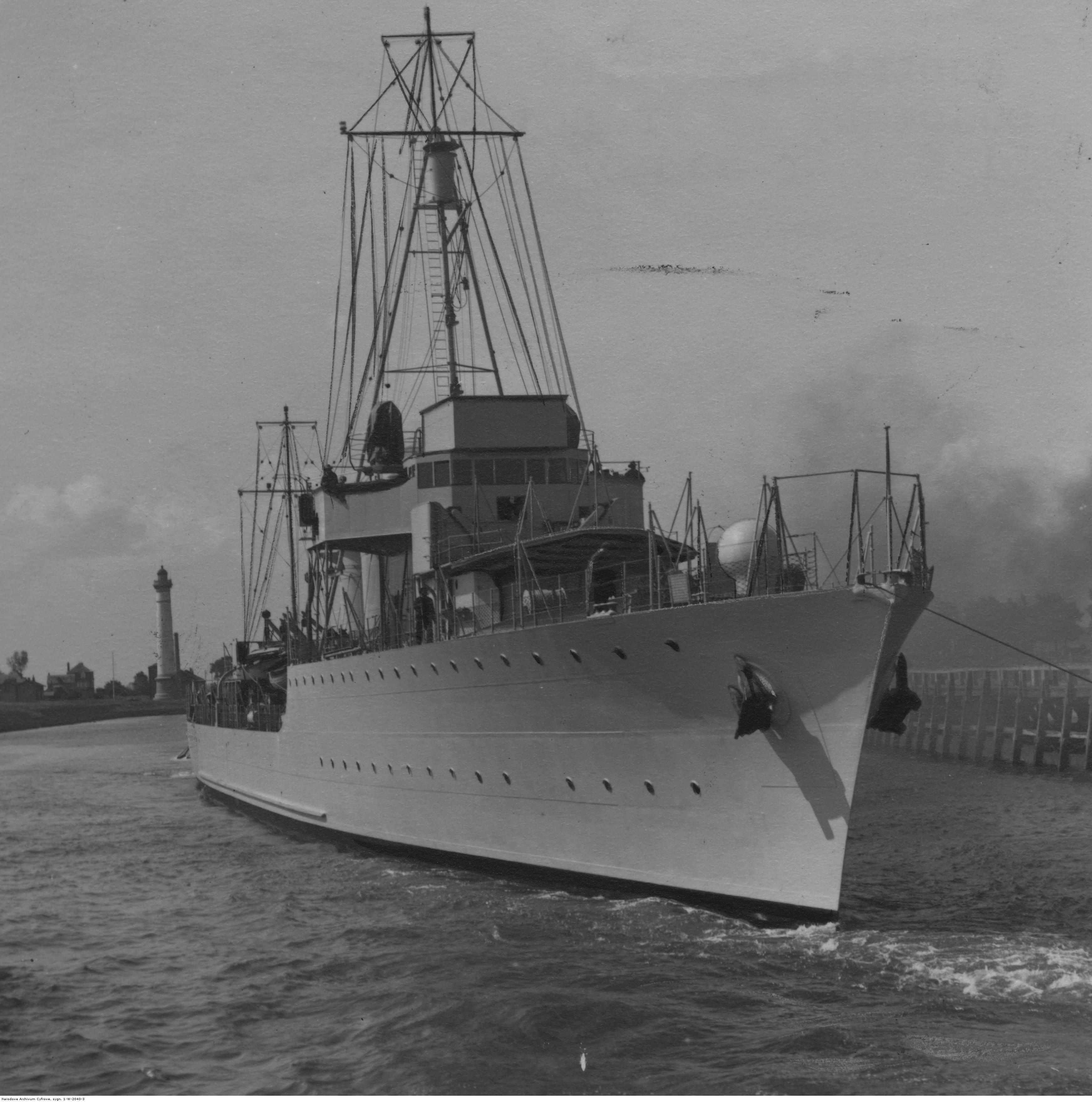 Niszczyciel ORP "Wicher" w porcie.